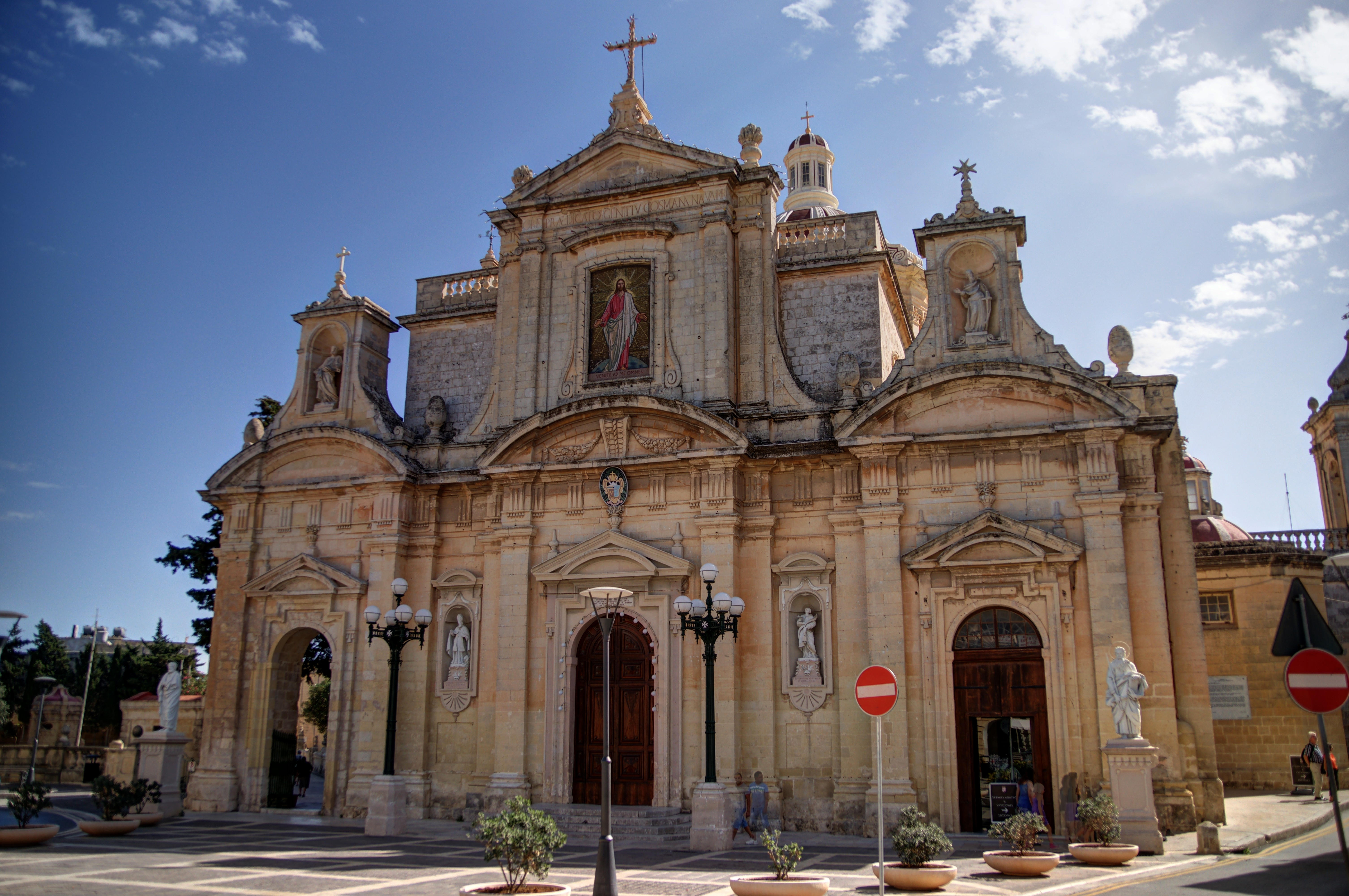 St. Paul's Church, rechts Zugang zur St. Publius - Kapelle